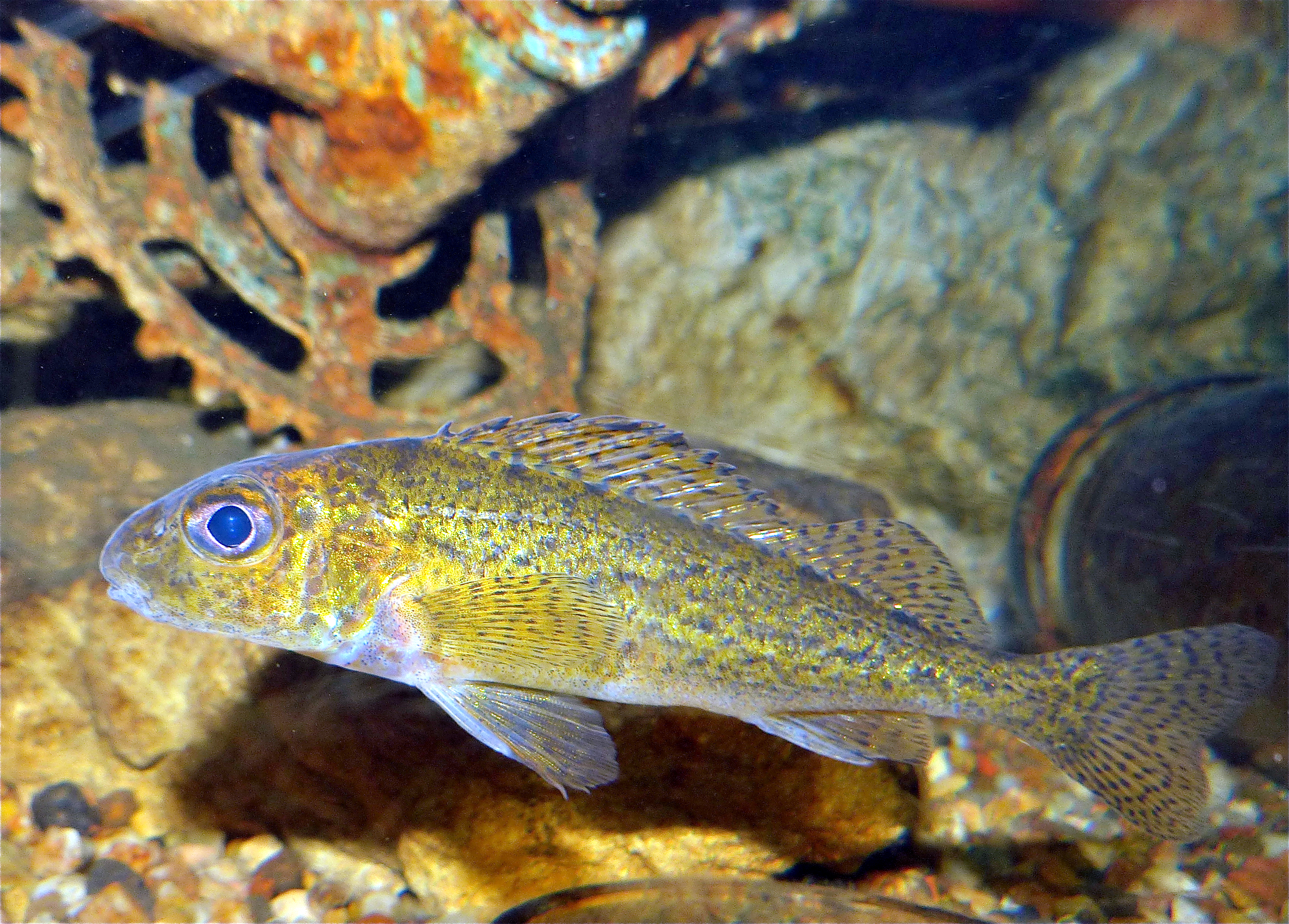 Aquarium du Val-de-Loire, Lussault-sur-Loire, Indre-et-Loire, FRANCE